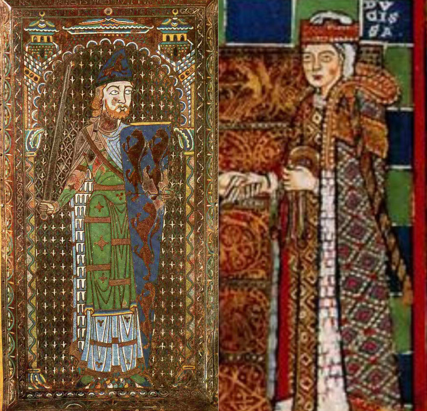 Evangeliář Jindřicha Lva; Gospels of Henry the Lion, 1175-88, Illumination on parchment, 340 x 255 mm, Herzog August Bibliothek, Wolfenbüttel - This file has no sense!! The woman on the right is not Empress Matilda (wife of Geoffrey V of Anjou and mother of Henry II of England) but Matilda of England, wife of Henry the Lion, daughter of Henry II and so granddaughter of the woman that she is said to be in this file!!